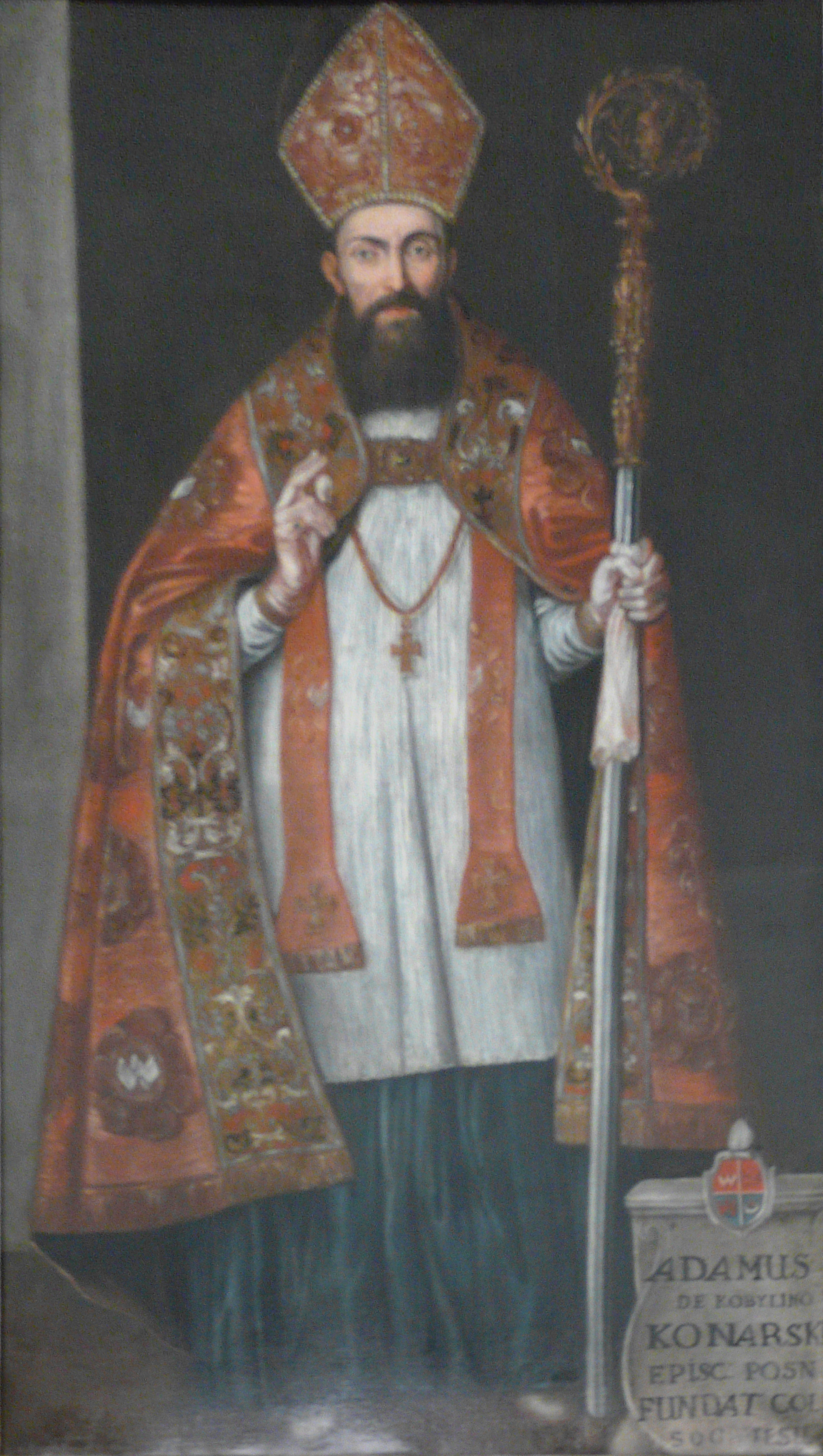 Bishop Adam Konarski